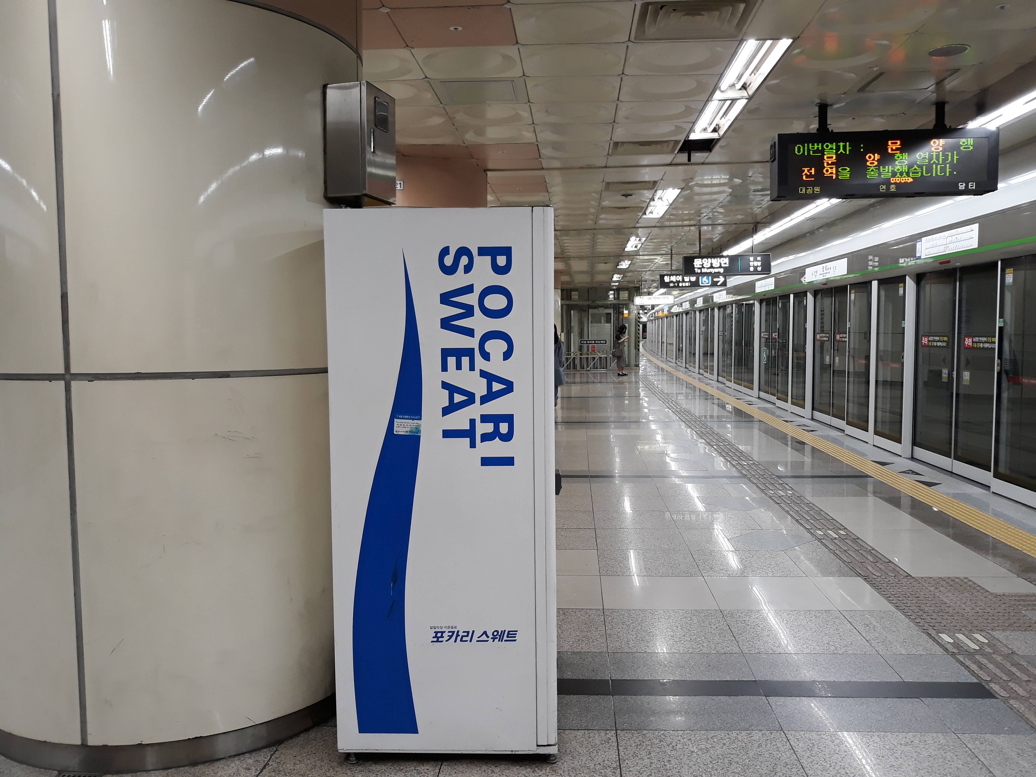 대구 도시철도 2호선 담티역 문양 방면 승강장